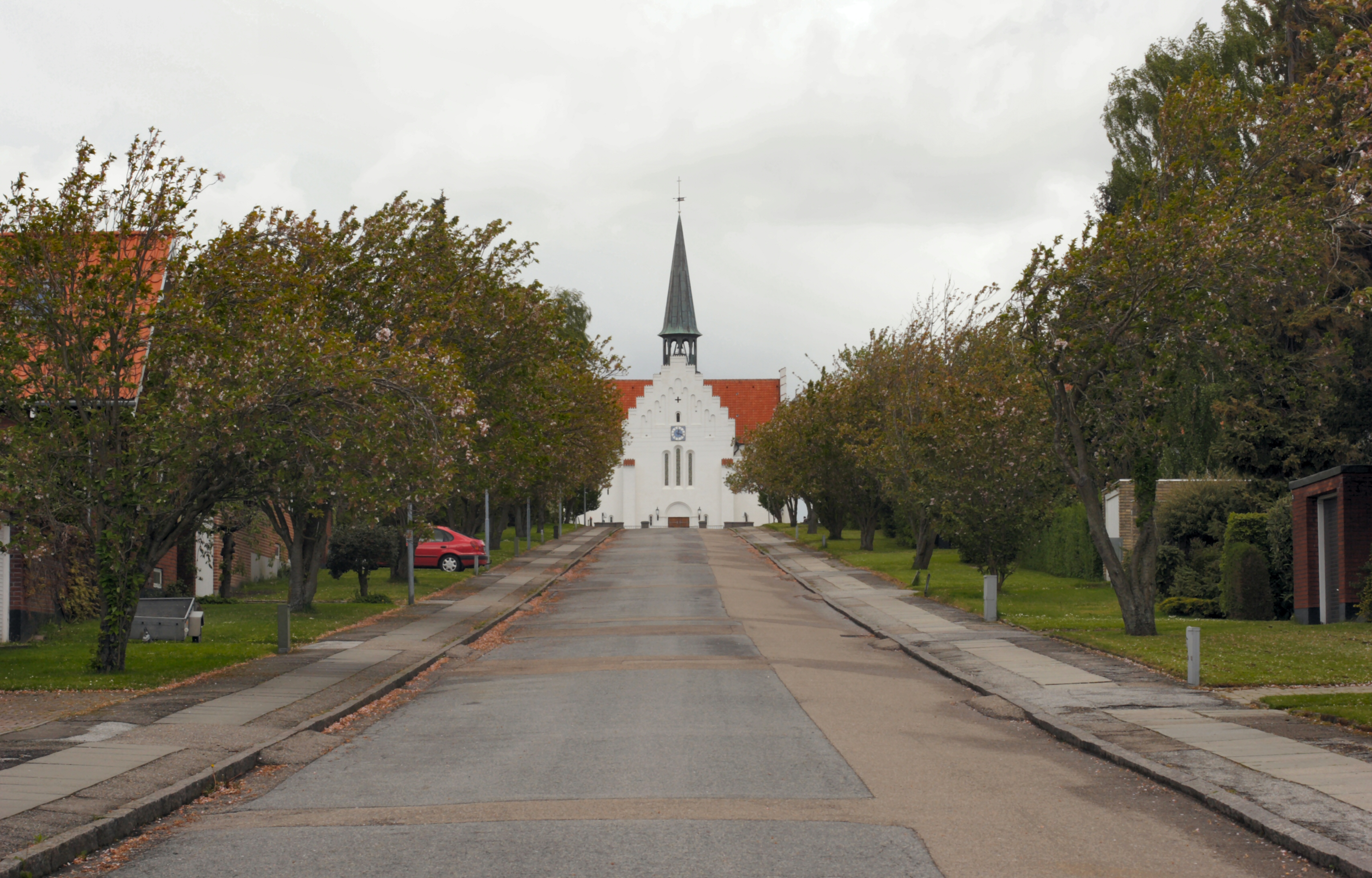 Åbyhøj Kirke set fra Kresten Kolds Vej